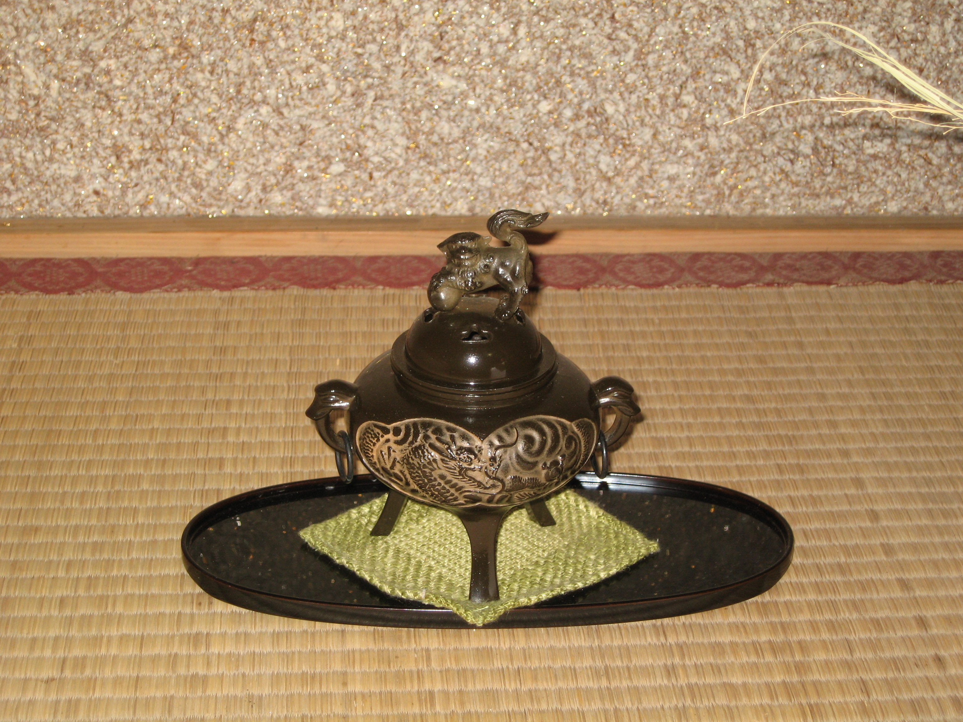 床の間にしつらえた香炉